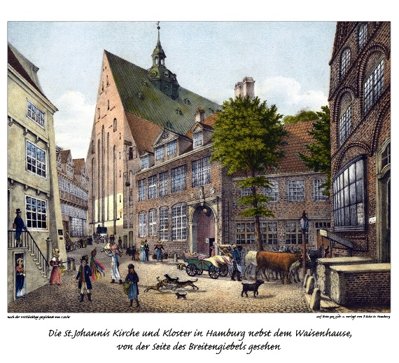 Blick südwestwärts durch Hinter dem Breiten Giebel zum breiten, da schräg zum Kirchenschiff verlaufenden Ostgiebel der Klosterkirche St. Johannis etwa 1825 oder 1829, vorbei am breiten Giebel knickt Hinter dem Breiten Giebel (auch: Hinter dem Breitengiebel) leicht nach Südsüdwest verschwenkt ab. Die Klosterkirche gehörte zum St. Johanniskloster, das Graf Adolph IV. von Holstein aus dem Hause Schauenburg 1236 als Dominikanerkloster St. Johannis (Johannes der Evangelist und Johannis der Täufer) gründete. 1529 wurde das Dominikanerkloster aufgelöst und das 1529 gegründete Johanneum bezog einen Teil des Klosters. Die obdachlos gewordenen Nonnen des Klosters Herwardeshude (Harvestehude) bezogen 1530/31 nach ihrer Konversion zum Luthertum ebenfalls Teile der Baulichkeiten des Klosters, worin sie ein lutherisches Damenstift einrichteten. Die Klosterkirche wurde lutherisch. DDie Klostergebäude wurden 1840 abgerissen. Lithographie von Peter Suhr, etwa 1825 oder 1829.